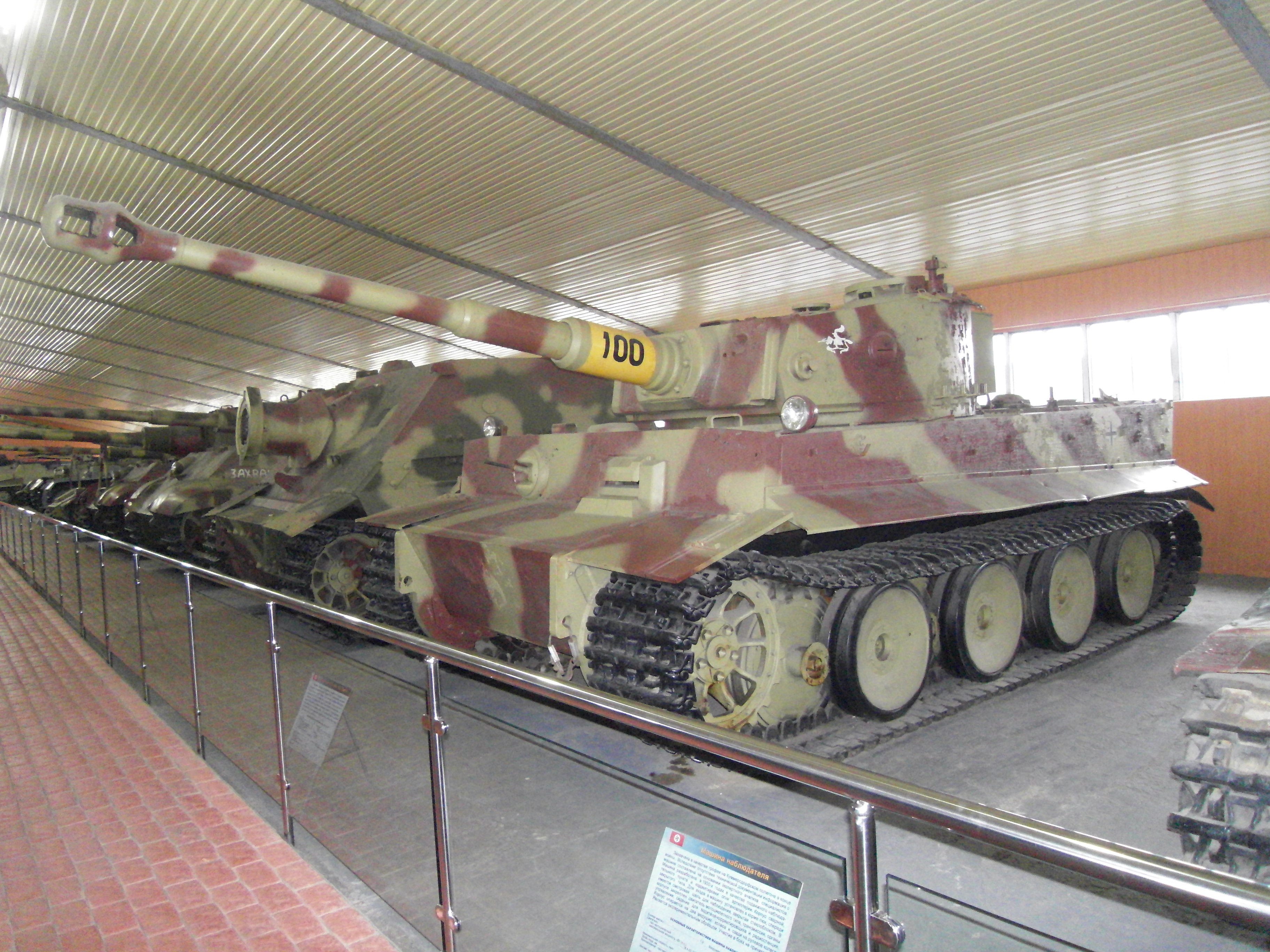 Германска бронетанкова техника от Втората световна война, Бронетанков музей в Кубинка, Русия. На преден план: тежък танк Panzerkampfwagen VI Ausf. H1, Tiger.